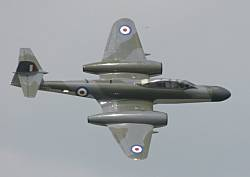 Gloster Meteor Foto gemaakt tijdens Open Dagen op Vliegbasis Twenthe op nl:21 juni nl:2003. (eigen opname) Categorie:Afbeelding vliegtuig